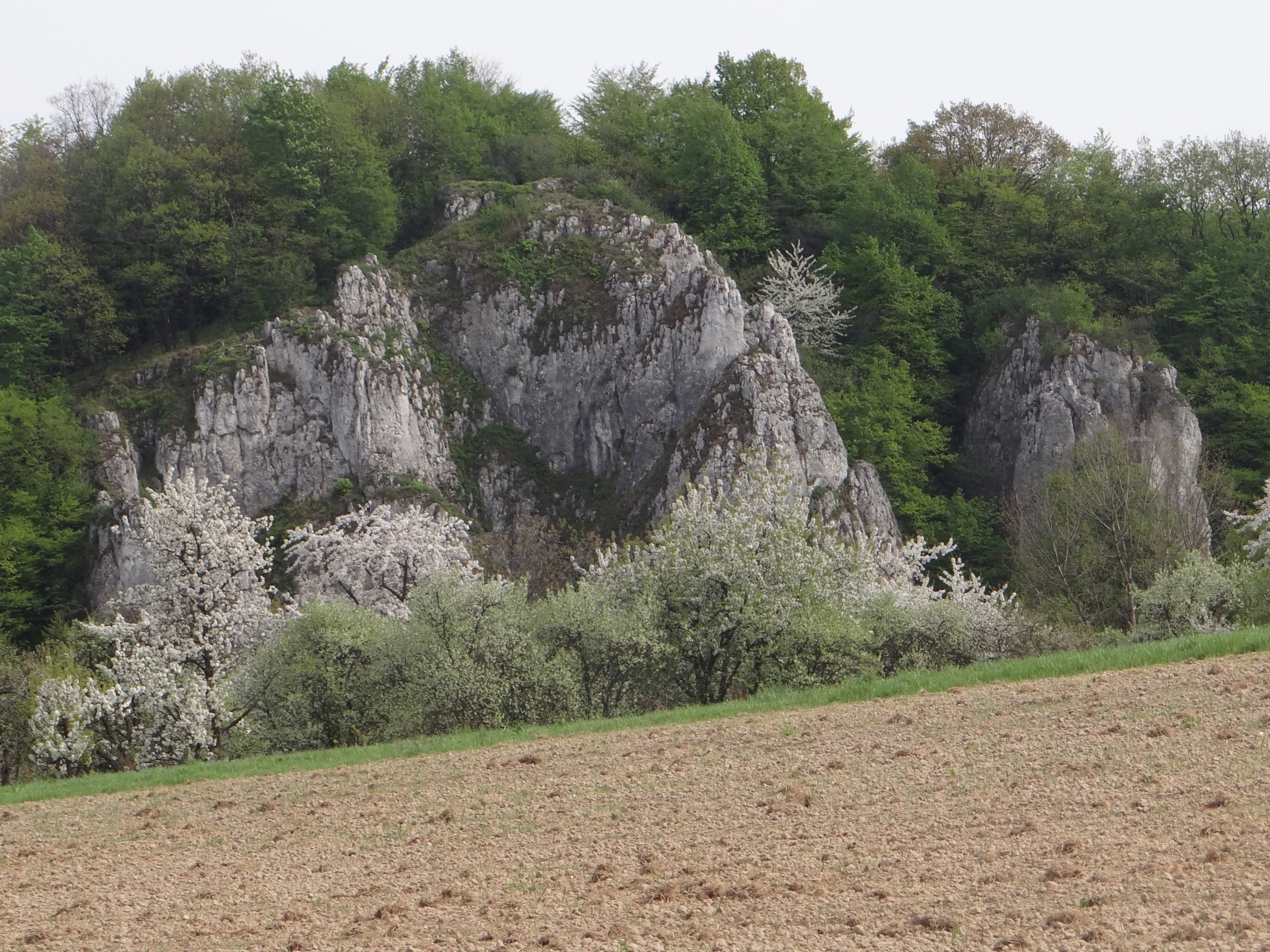 Od lewej; Skała Jaskinii Wierzchowskiej Górnej, Poprzeczna Turnia i Zaroślak